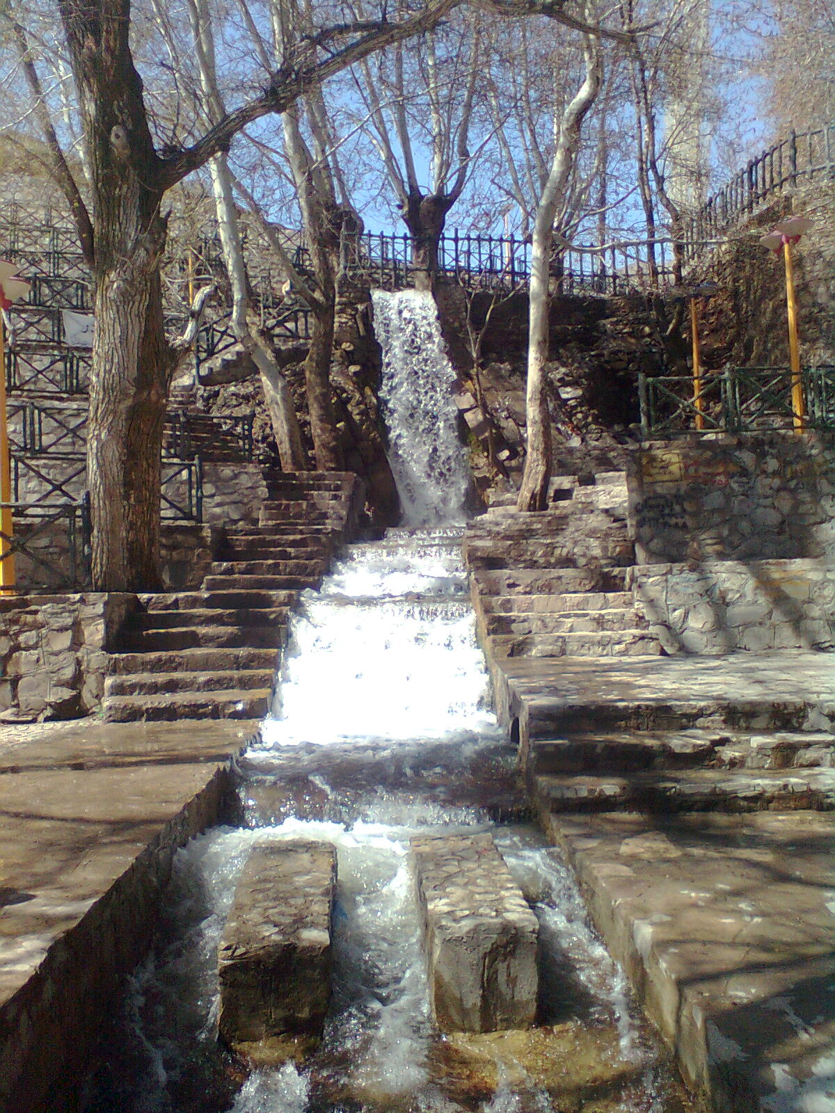 درود شهر آبشار ها